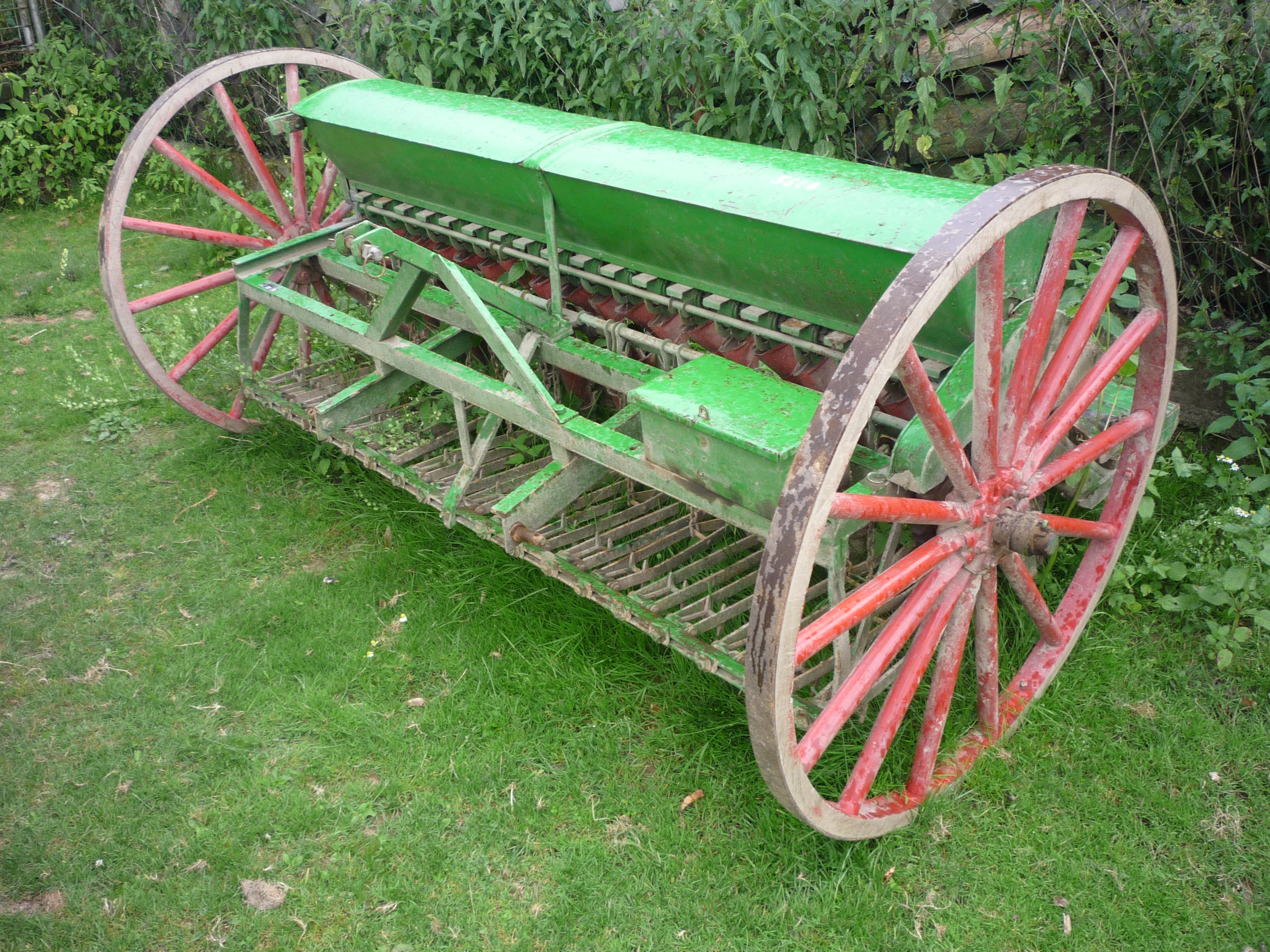 Autor fotografie Jiří Zelenka. Secí stroj. Původně určený za koně, dodatečně předělán pro zapojení za traktor. Výroba Německo. Czech Republic.